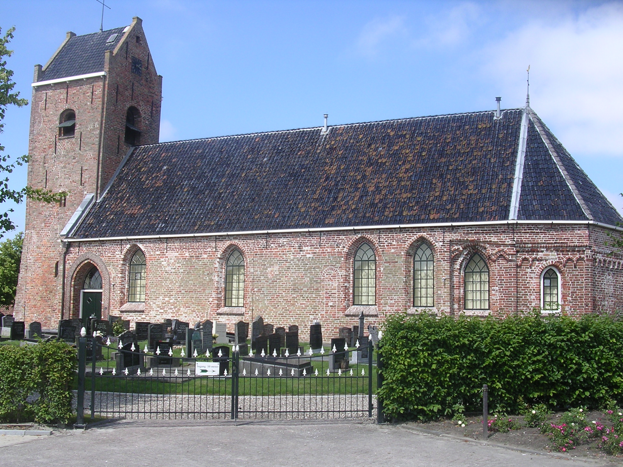 Nes Herfoarme Tsjerke